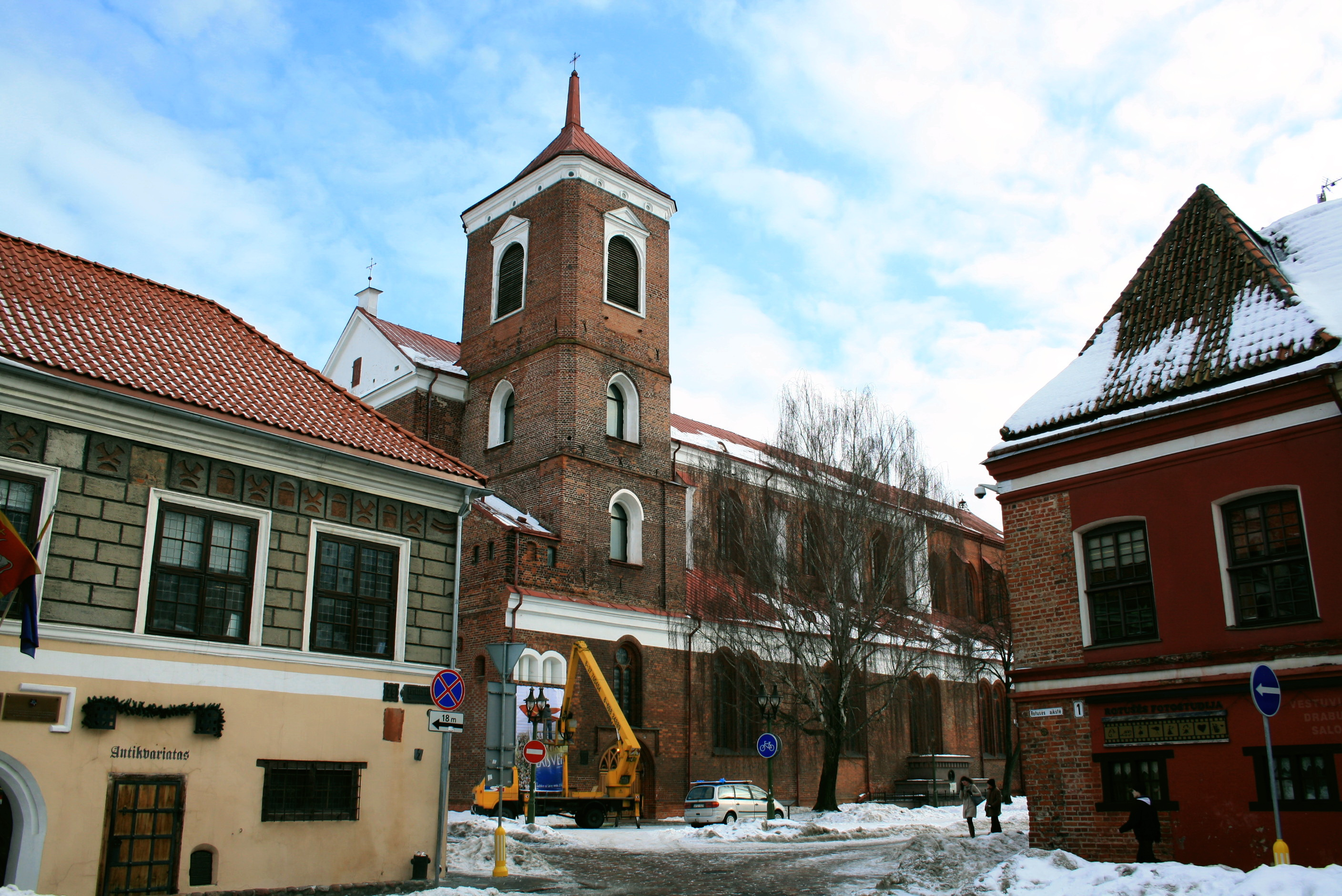 Litauen - Kaunas. Kathedrale-Basilika St. Peter und Paul. Gebaut 1408. Größtes gotisches Bauwerk in Kaunas. Adresse: Kaunas, Vilniaus Str. 1.